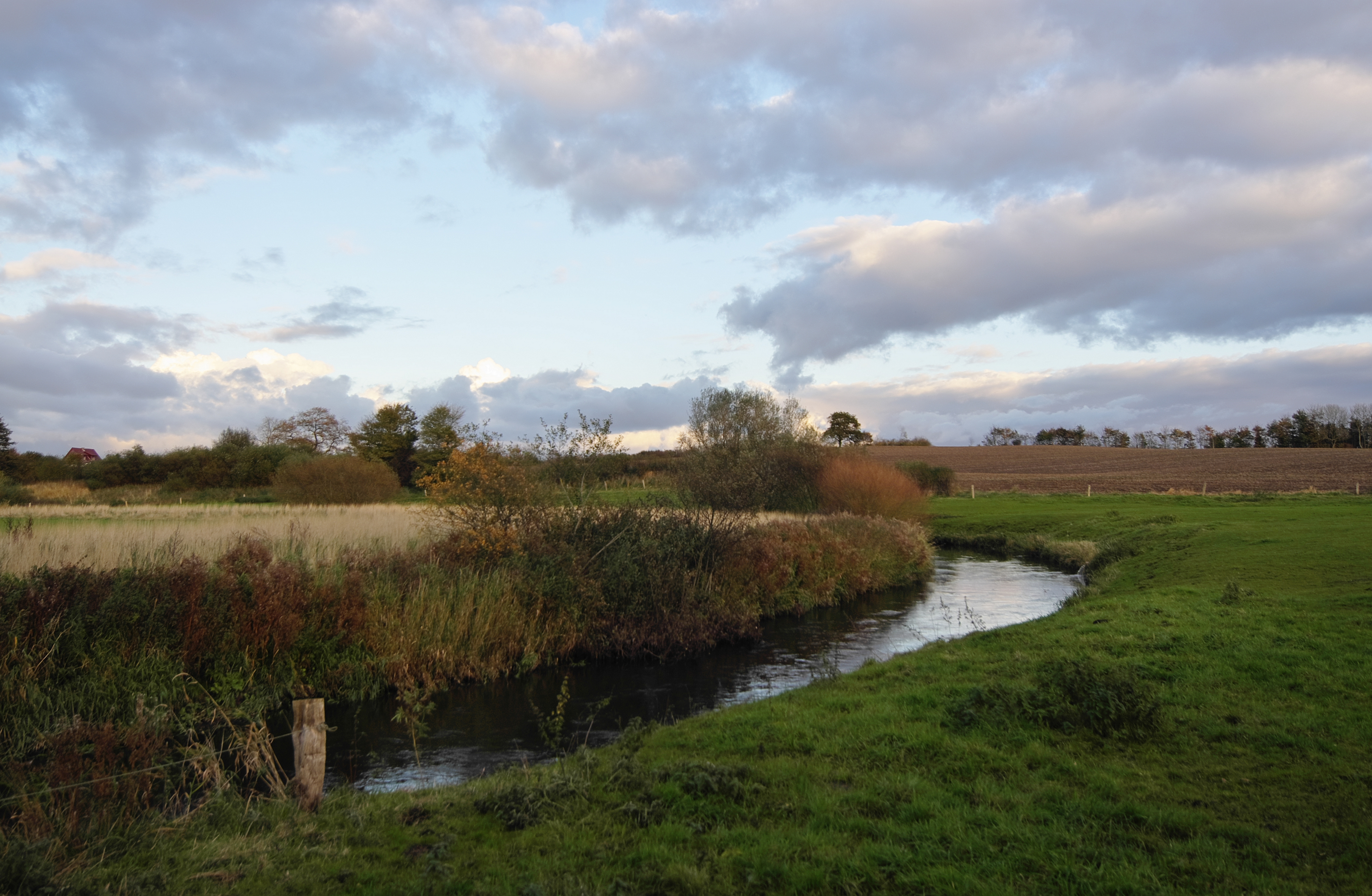 Taarstedt, Kreis Schleswig-Flensburg. Füsinger Au bei Westerakeby